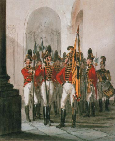 Österreich-Ungarn Trabanten-Leibgarde Mitte des 19. Jahrhunderts